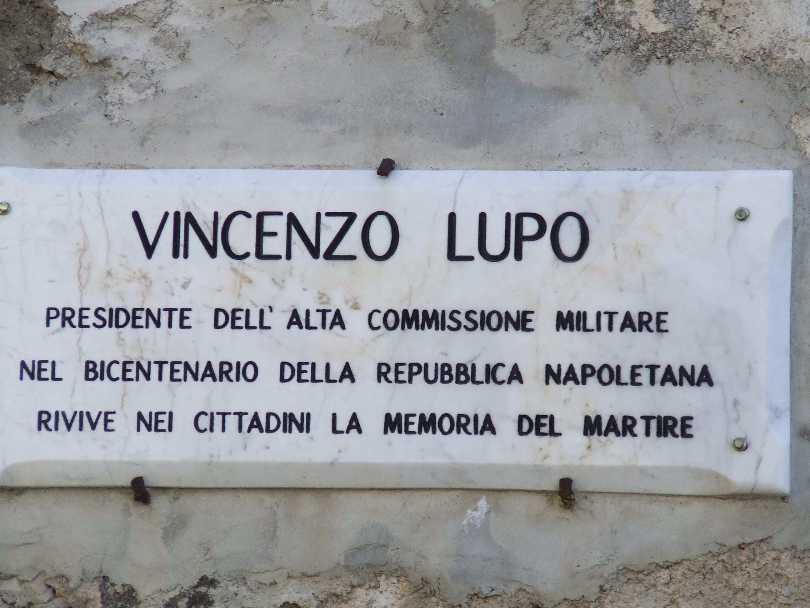 Lapide in Caggiano che ricorda il patriota Vincenzo Lupo.